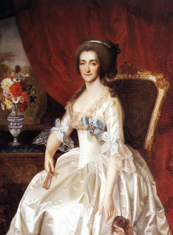 Графиня Е.А.Воронцова, видоизмененная копия с оригинала Левицкого